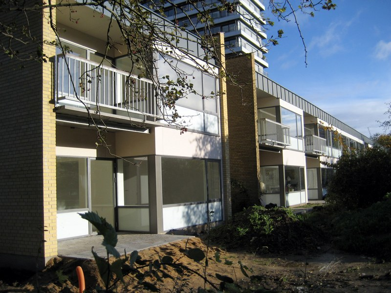 Plejehjemmet Langenæs november 2006